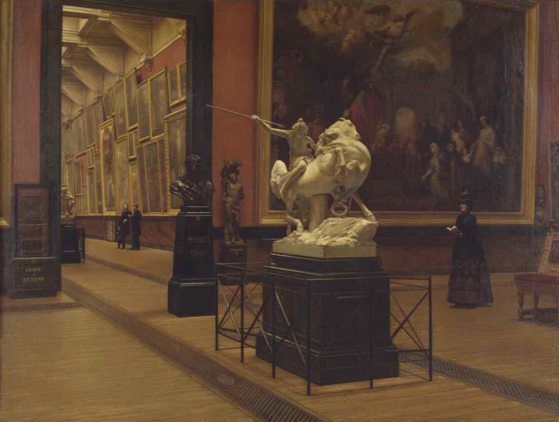 Binnenzicht van het museum van de Academie, door de Belgische schilder Henri Van Dyck